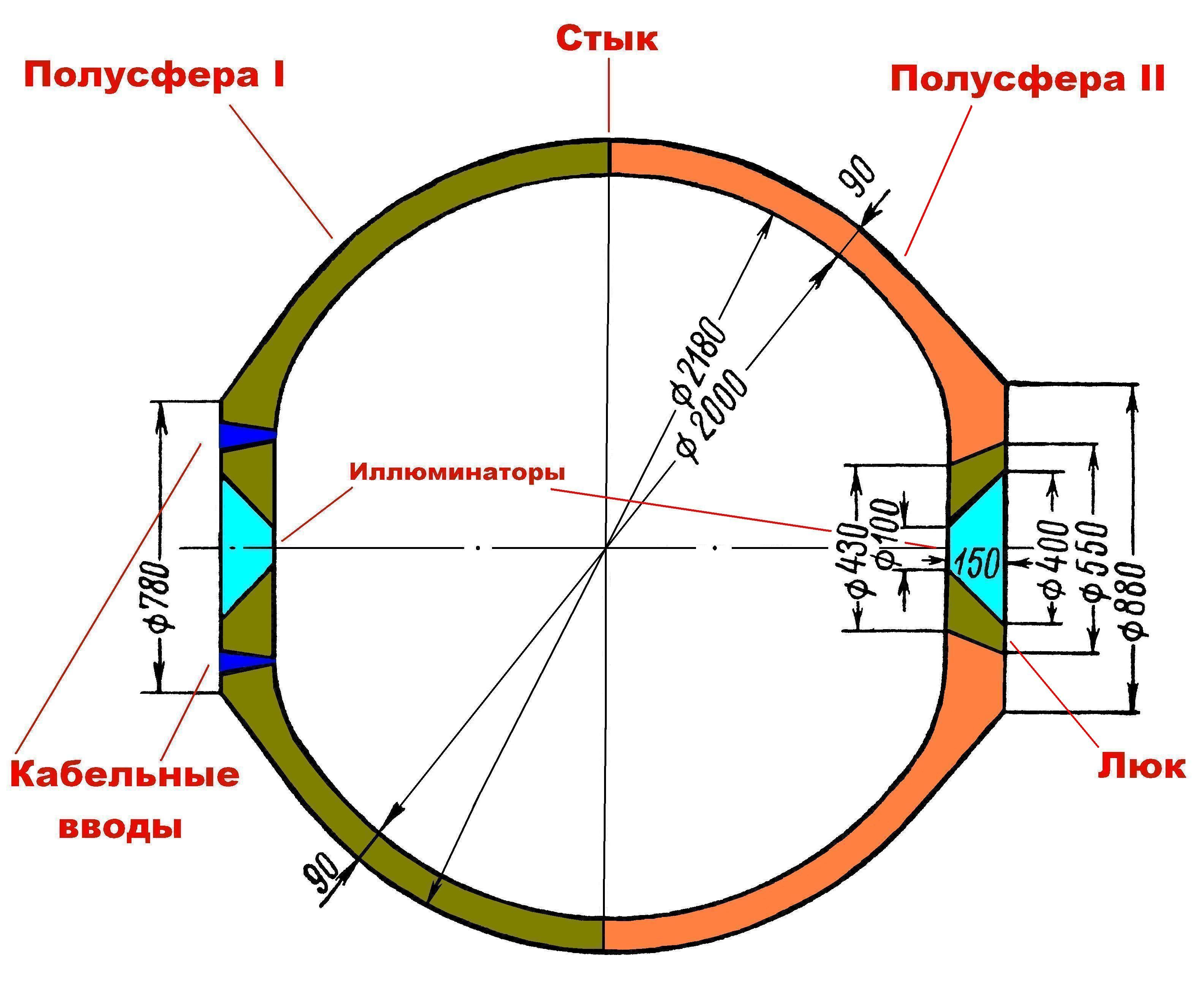 Гондола батискафов ФНРС-2, ФНРС-3, раннего Триеста